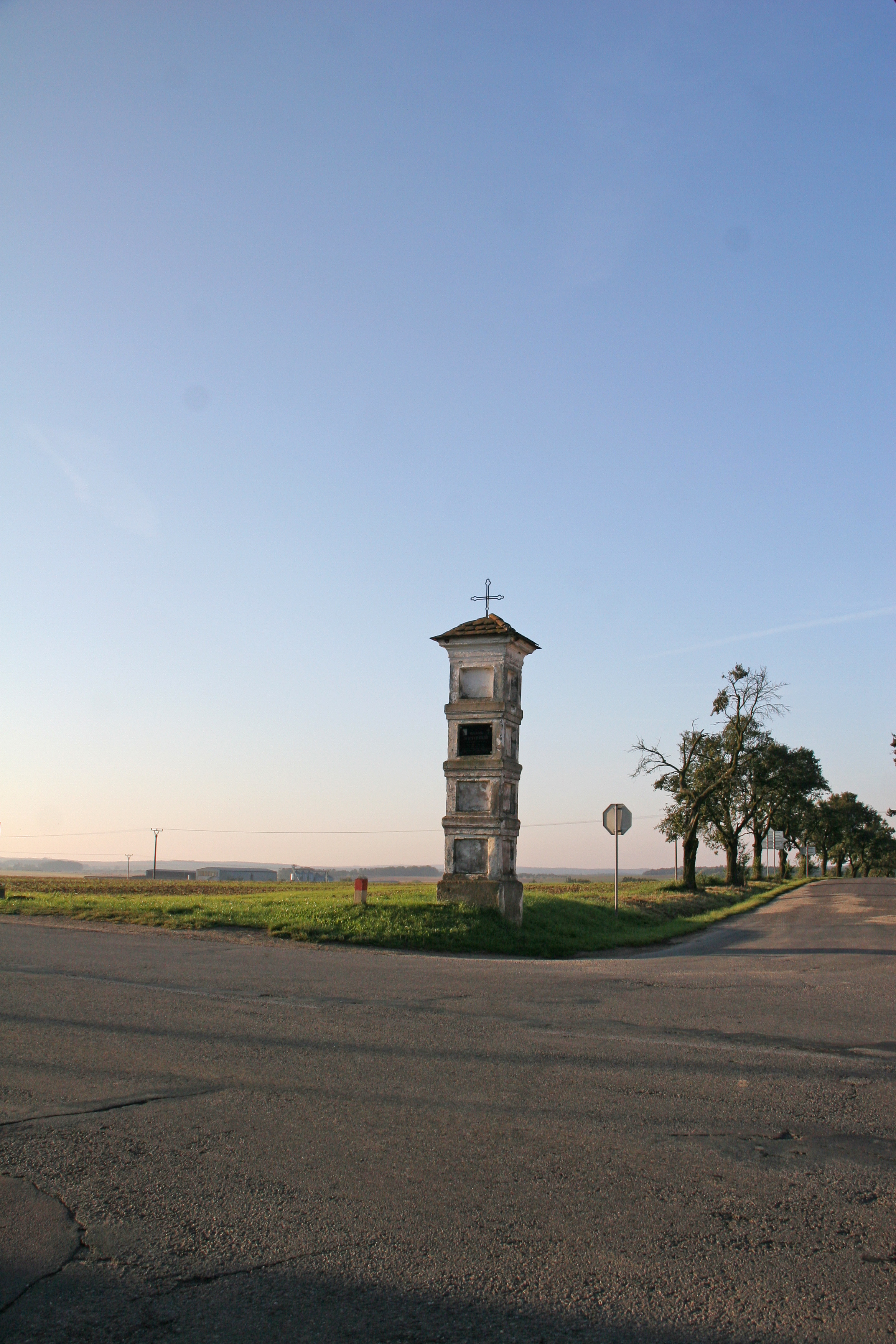 boží muka při silnici na Znojmo, Vracovice (okres Znojmo).